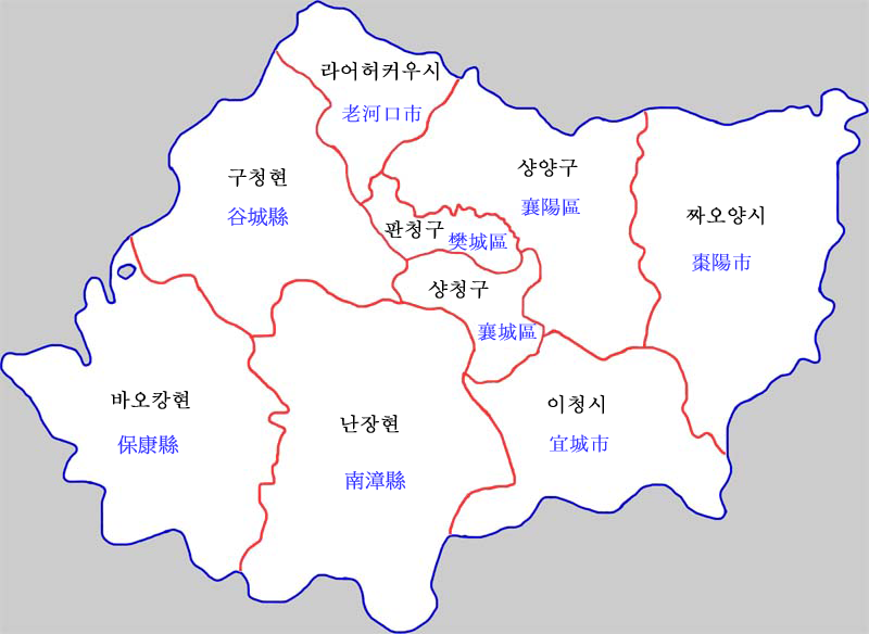 샹판시 현급구역도